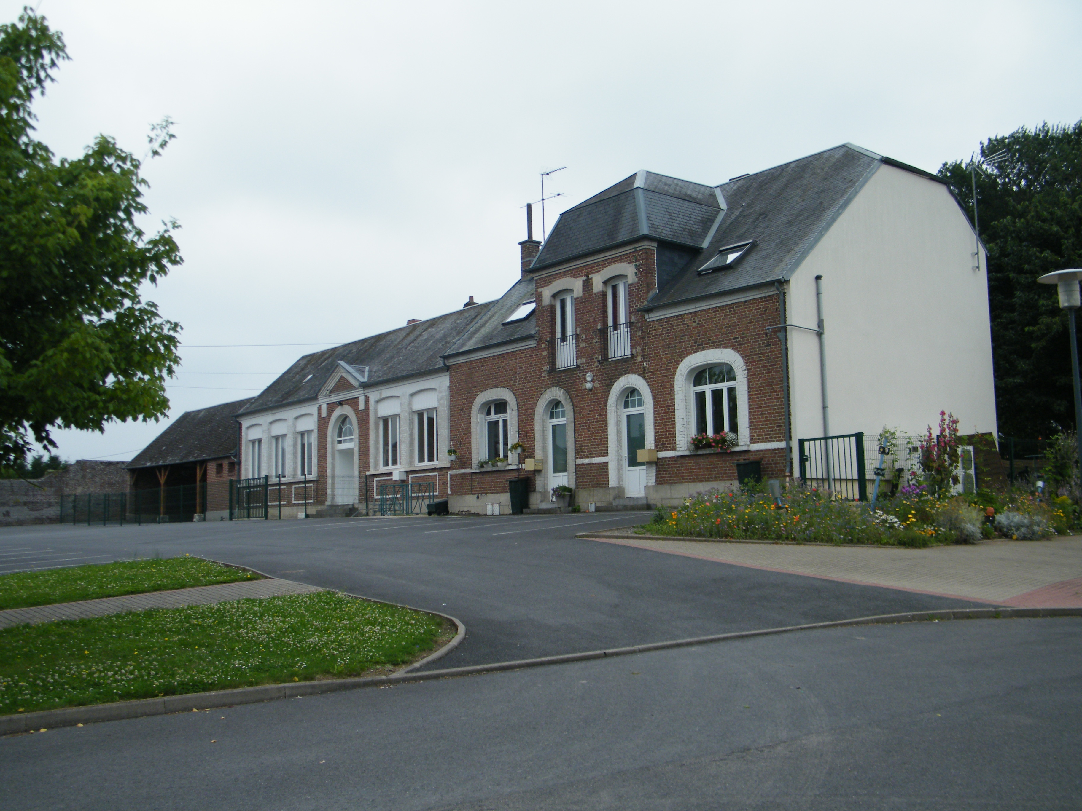 Mairie de Pertain, devenue mairie d'Hypercourt.